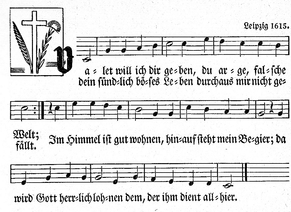 Valet will ich dir geben im Evangelischen Gesangbuch für Rheinland und Westfalen, hrsg. von der Rheinischen und Westfälischen Synode 1901, gedruckt von Verlag W. Crüwell und in Dortmund erschienen.